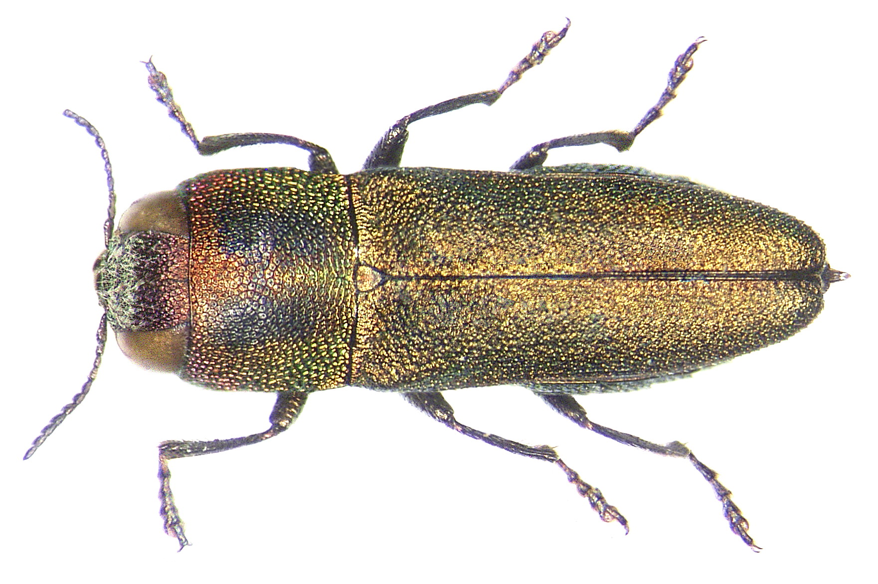 Familie: Buprestidae Grösse: 4 mm Verbeitung: Westafrika Fundort: Senegal, M`Bour leg. U.Schmidt, 1992; det. Mühle Foto: U.Schmidt, 2006